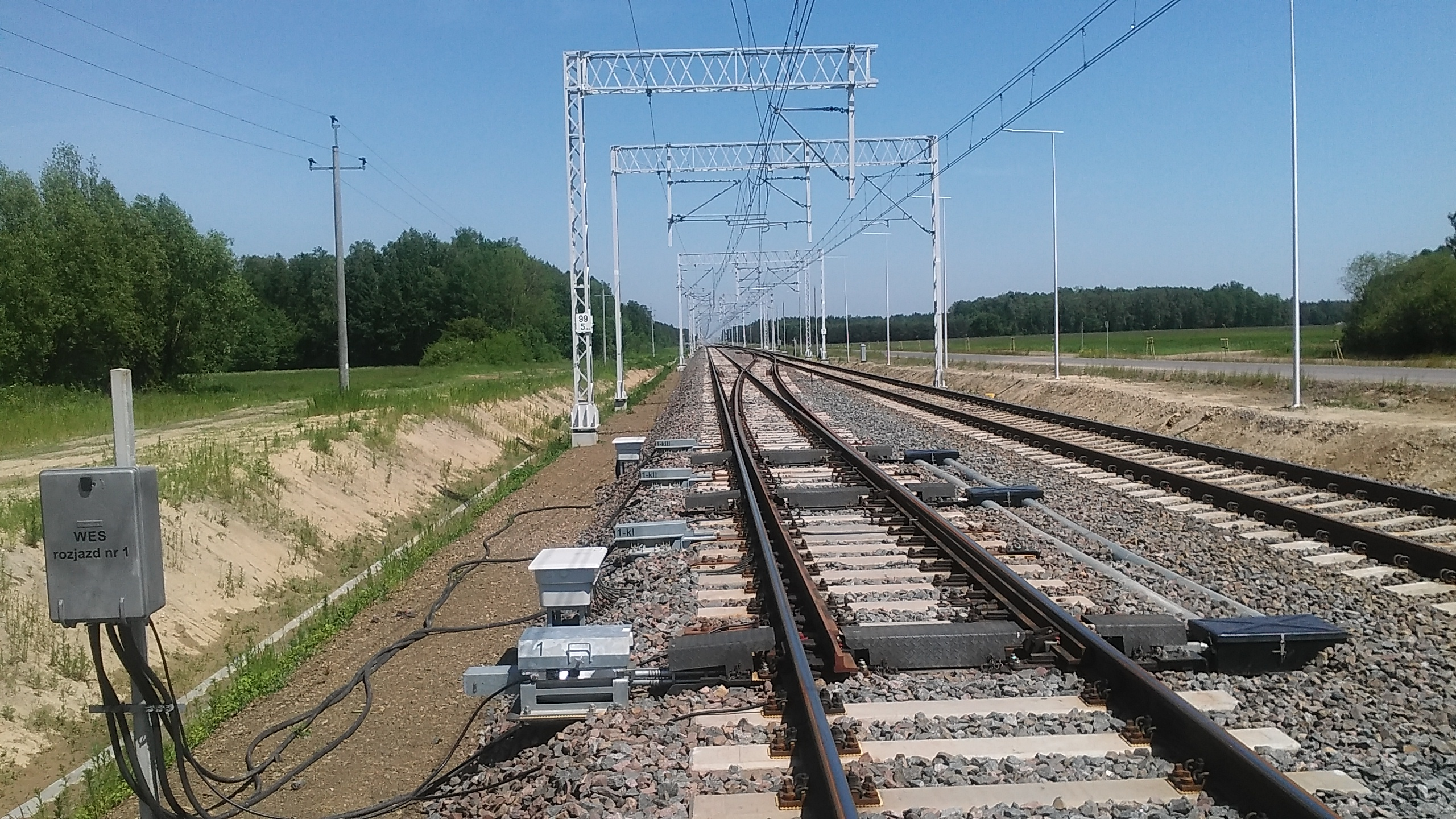 przystanek kolejowy Kietlanka - rozjazdy posterunku odgałęźnego, widok w kierunku Białegostoku